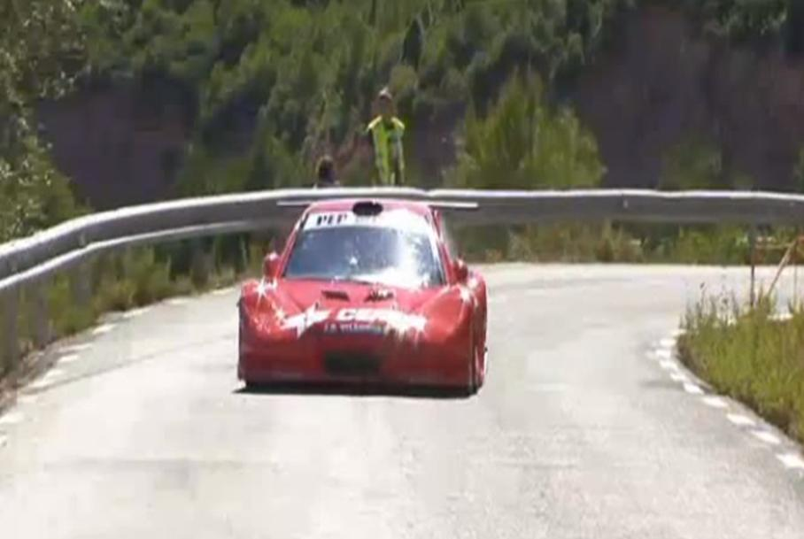 La carrera de muntanya que es disputa cada any al mes de setembre a la carretera de les Maioles, que va d'Igualada als Prats de Rei.